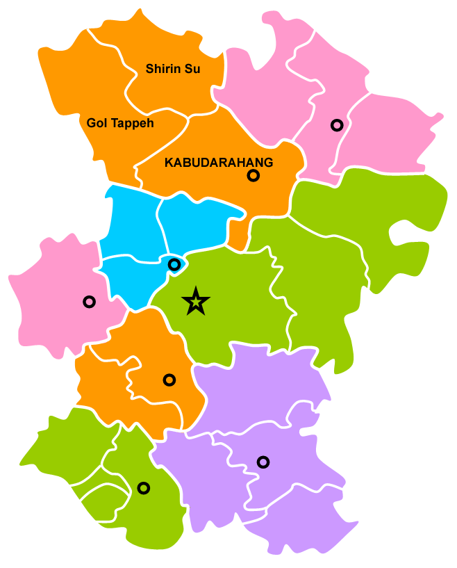 Kabudarahang sharestan Hamedan province, Administrative map